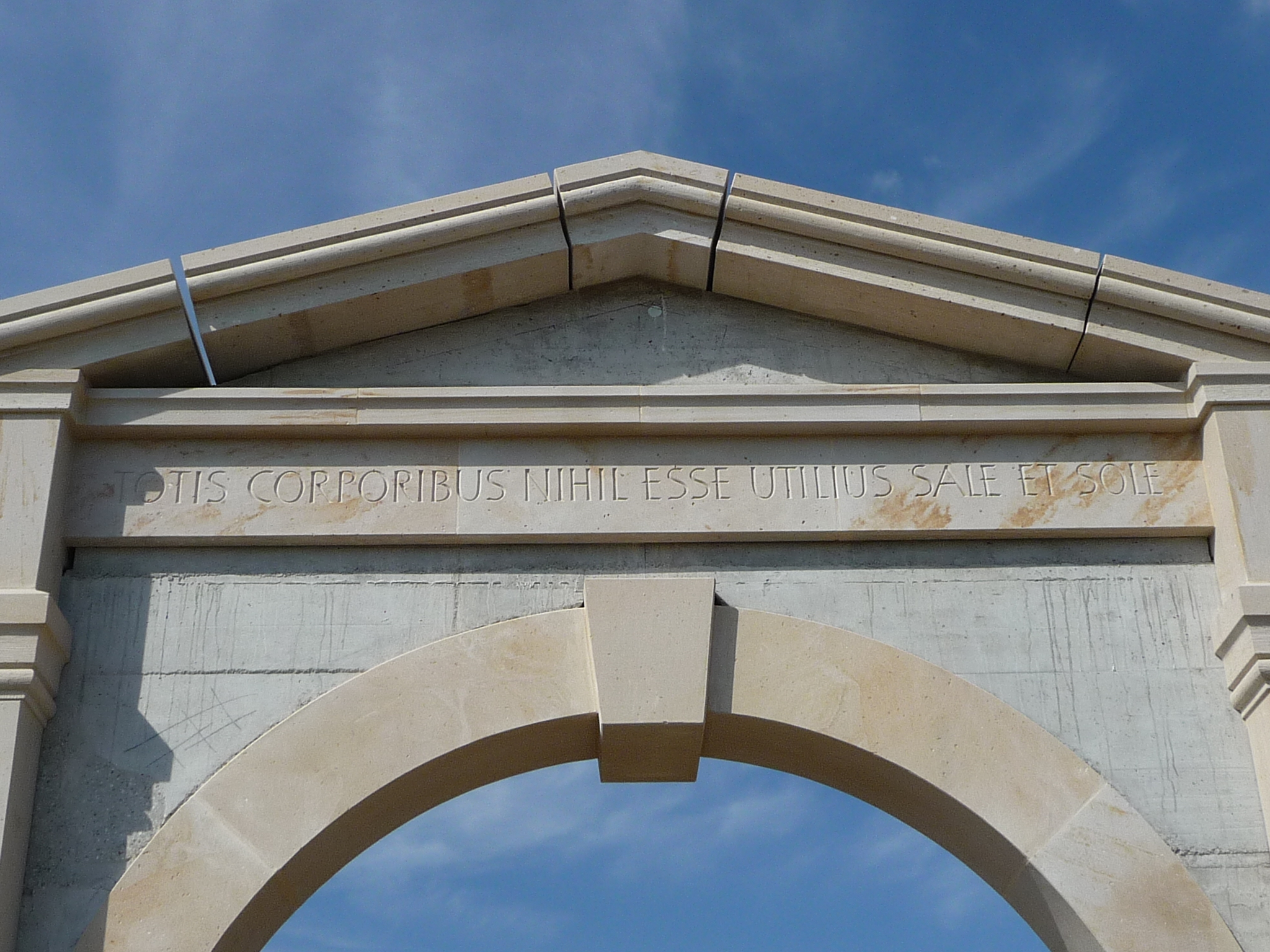 Gradierwerk (Bad Dürkheim)